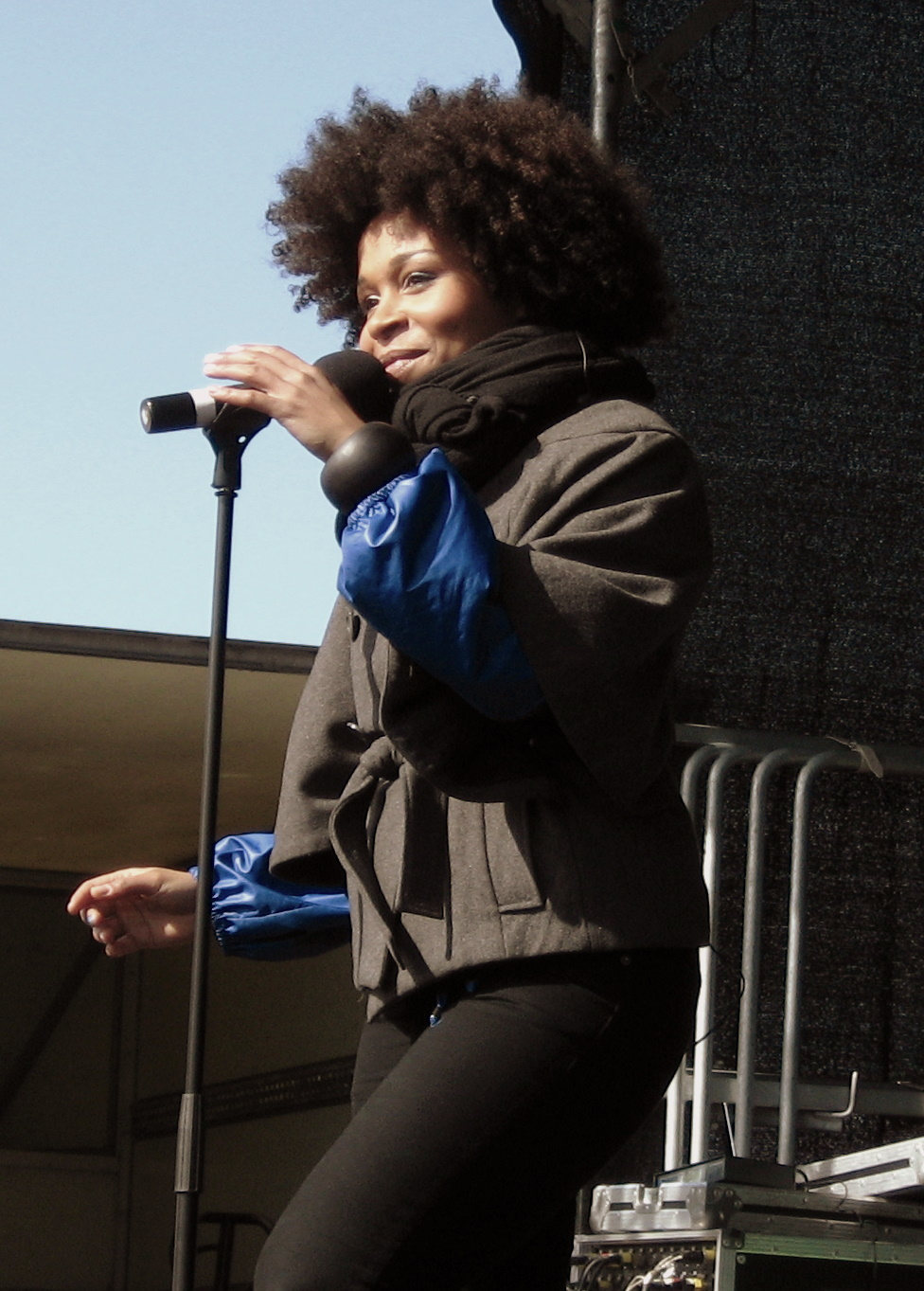 Nabiha @ Skovmand & Bues Fødselsdag i Hirtshals